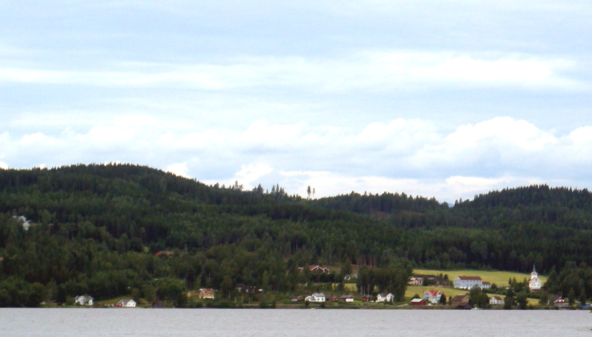 Bjoneroa sett fra Randsfjordferga